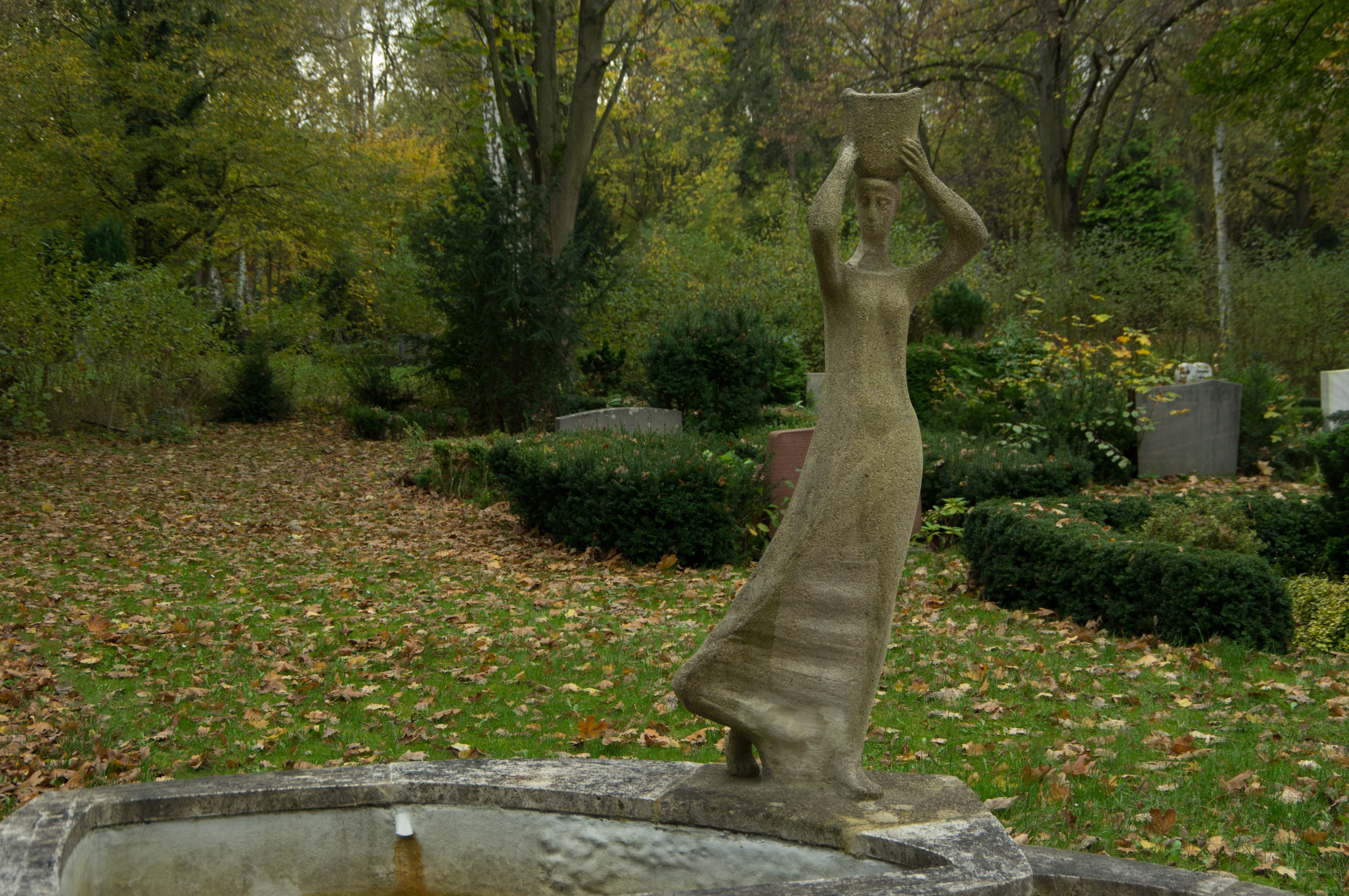 Neukölln in Berlin. Der Parkfriedhof befindet sich direkt nördlich de Britzer Garten an der Buckower Allee.